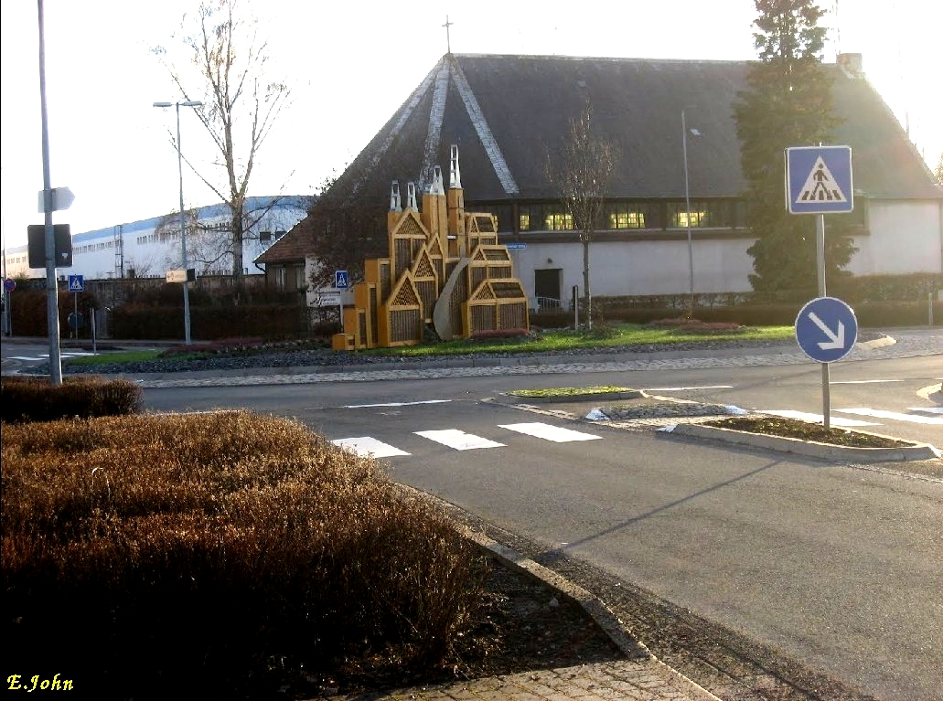 99734 Nordhausen, Justus-Jonas-Kirche, Hüpedenweg